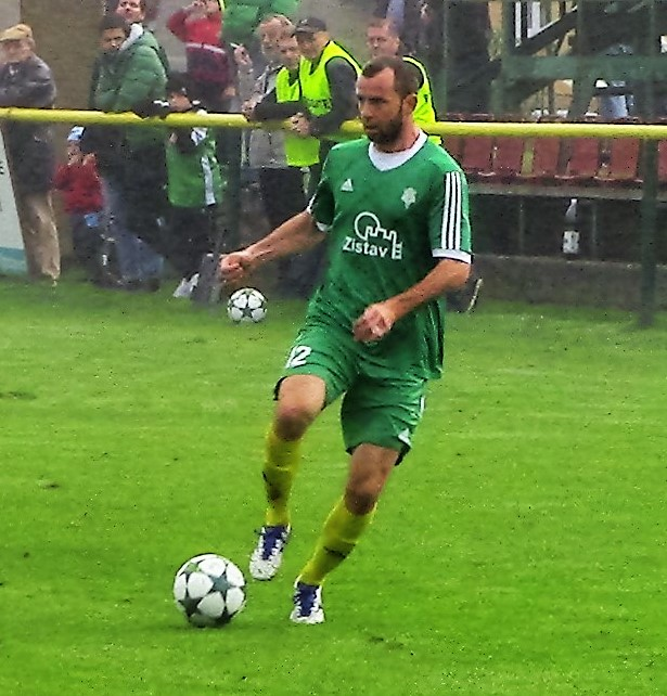 František Dřížďal